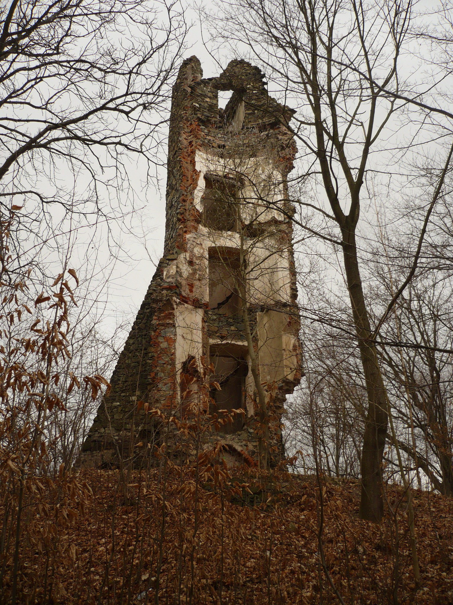 Wieża widokowa na wzniesieniu Grodziszcze